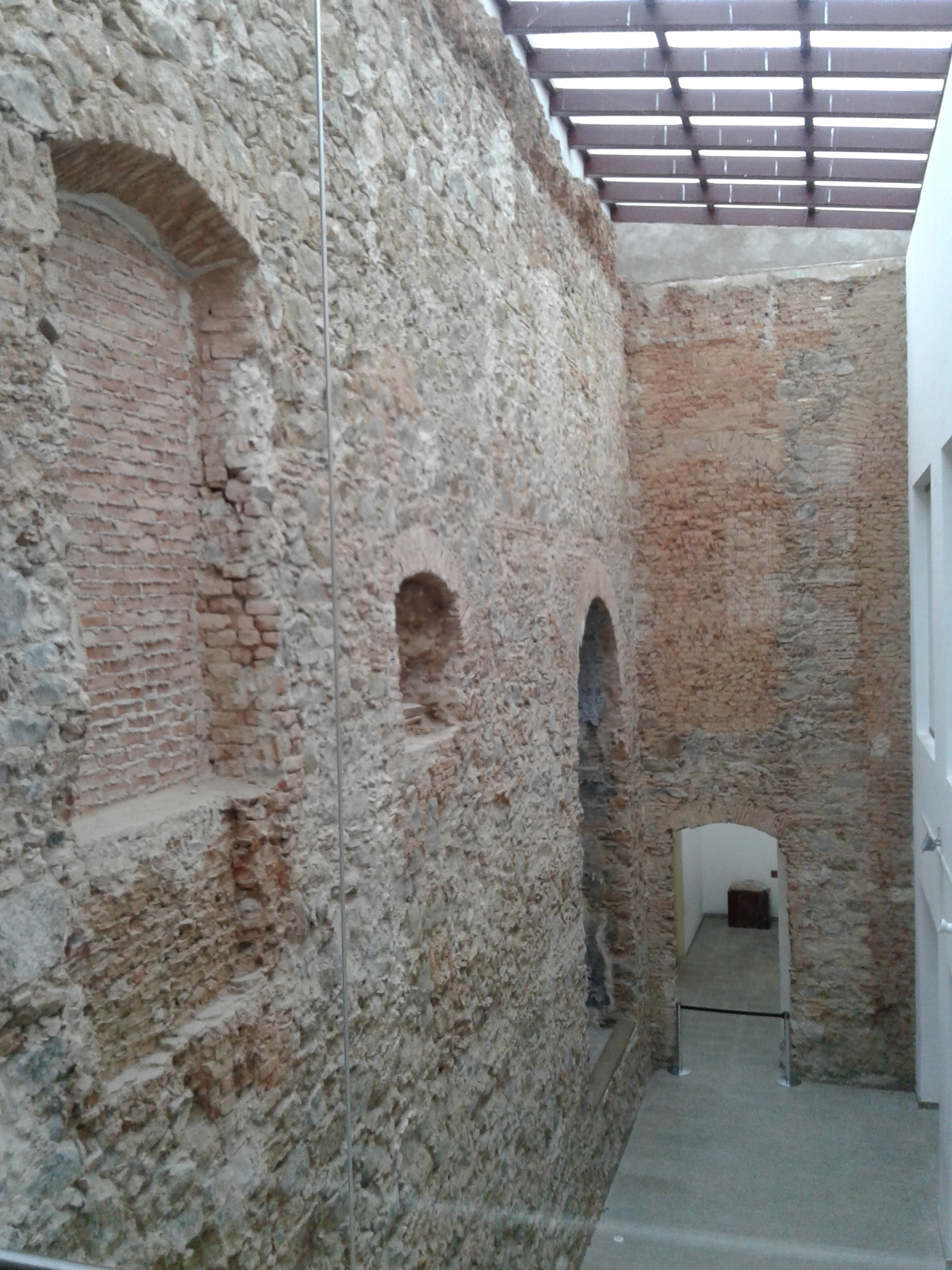 Foto dos altares laterais da antiga Igreja De São Tiago, tomada durante visitação do Palácio Anchieta.